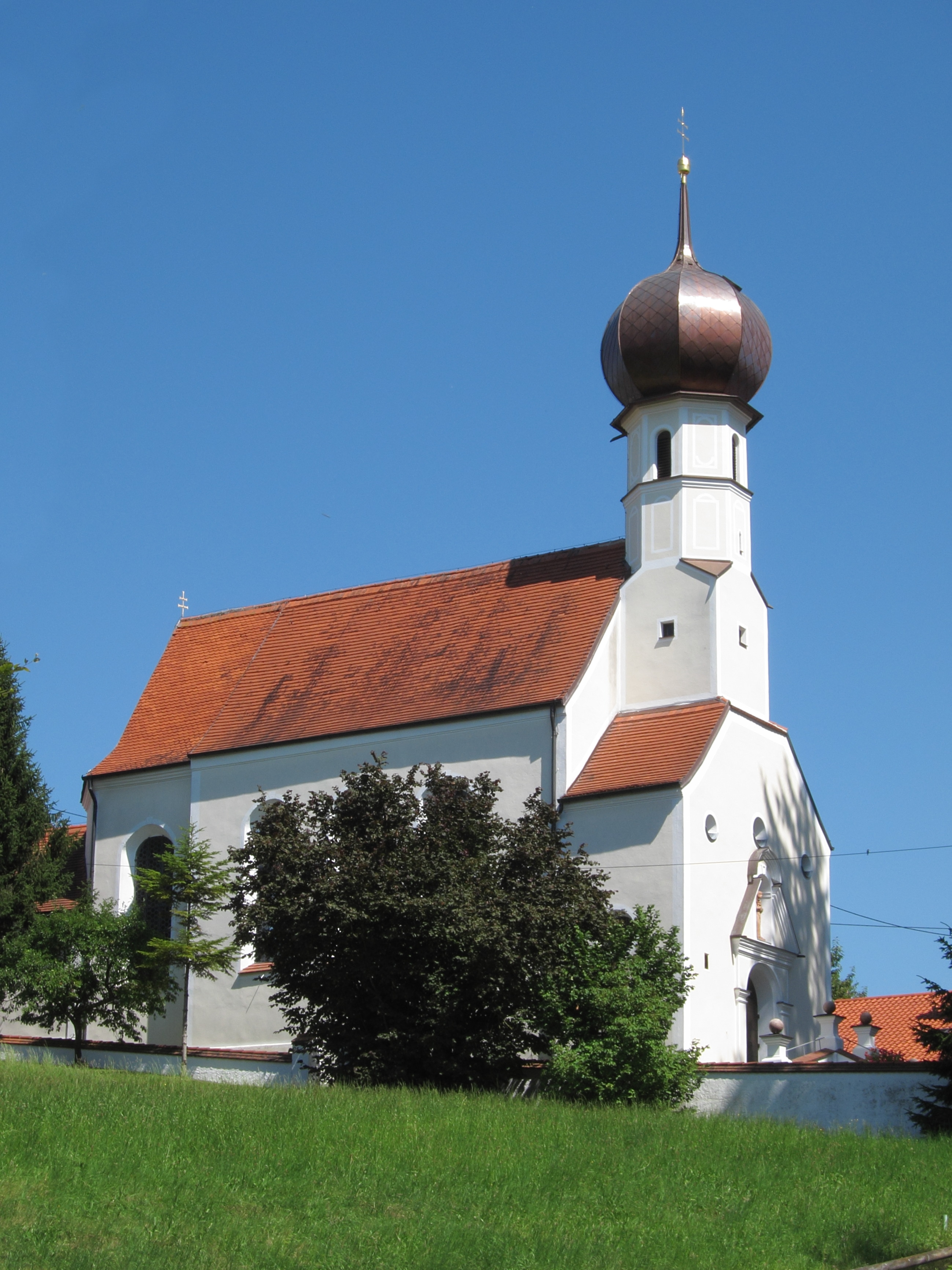 Zeilhofen 6; katholische Filialkirche St. Antonius von Padua, Saalbau mit eingezogenem Polygonalchor, angefügter Sakristei und Westturm mit Narthex und Zwiebelhaube, im Kern spätgotisch, sonst Neubau wohl von Hans Kogler 1666.